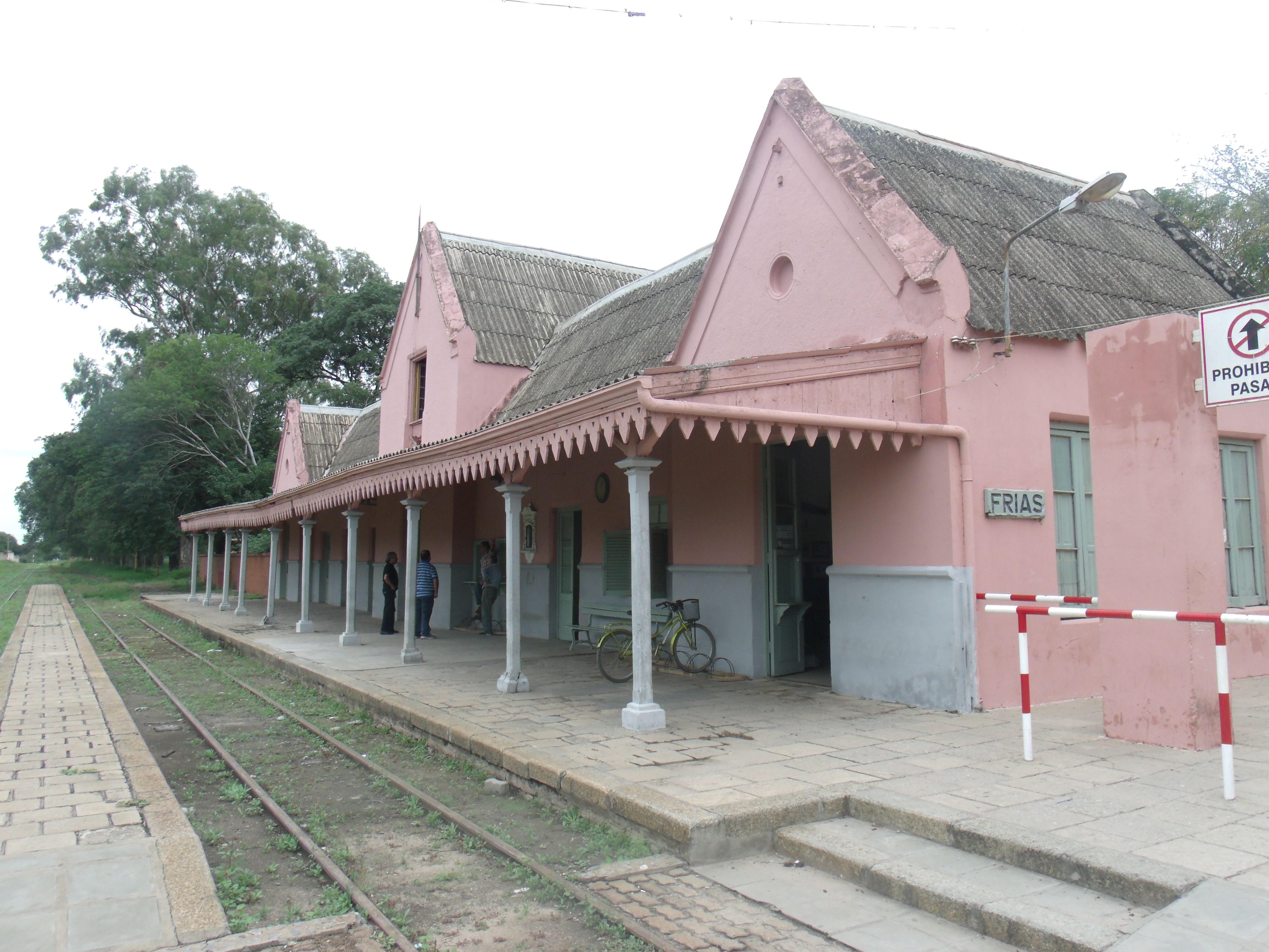 Remodelada estación de ferrocarril en el centro de Frías